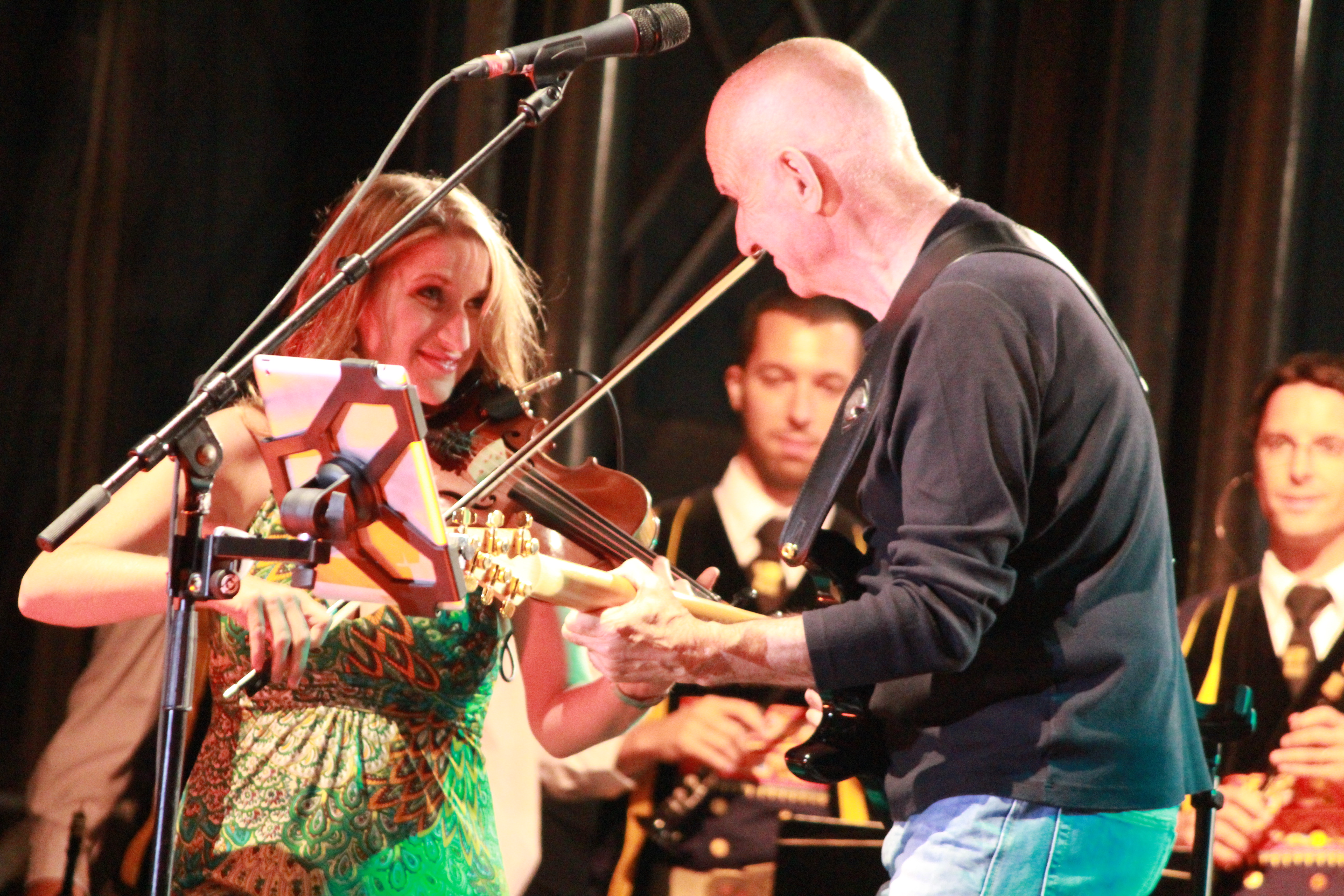 Dan Ar Braz et Dominique Dupuis lors de son concert inaugural de la tournée liée à la promotion de l'album Celebration, lors du Festival Interceltique de Lorient 2012.